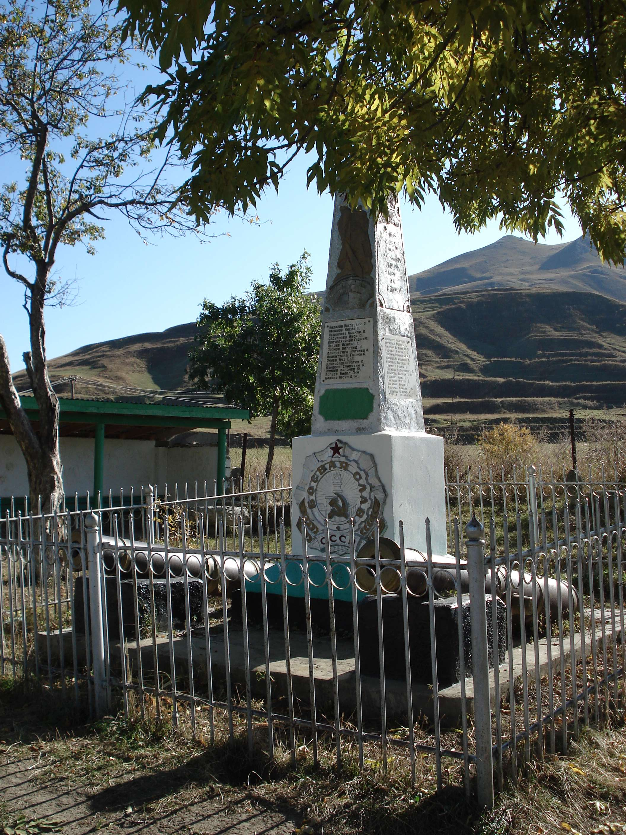 Лакский район, с. Хури